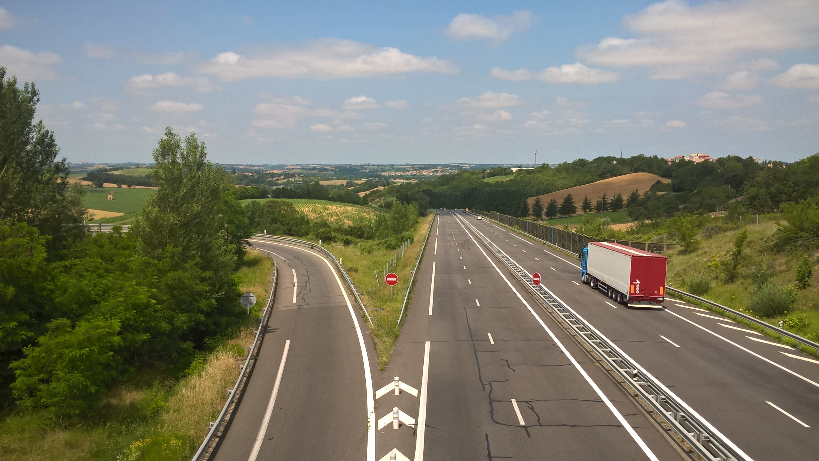 La route nationale 124 dans la Vallée de la Save.